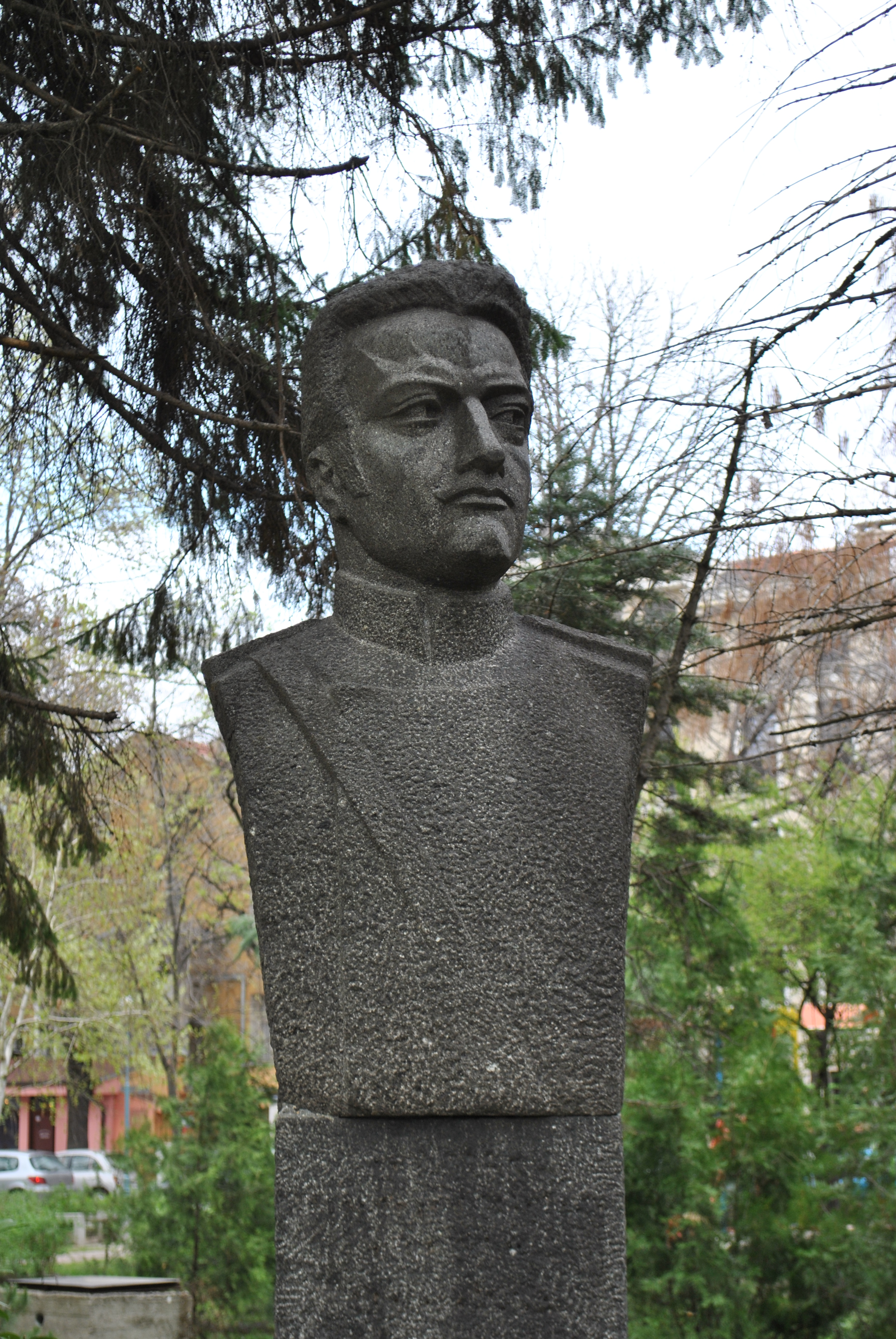 Паметник на Александър Бураго в Пловдив, България